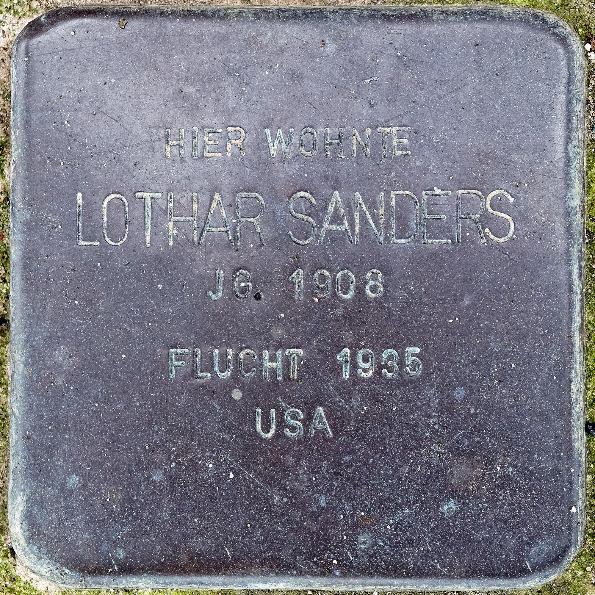 Stolperstein Sanders, Lothar